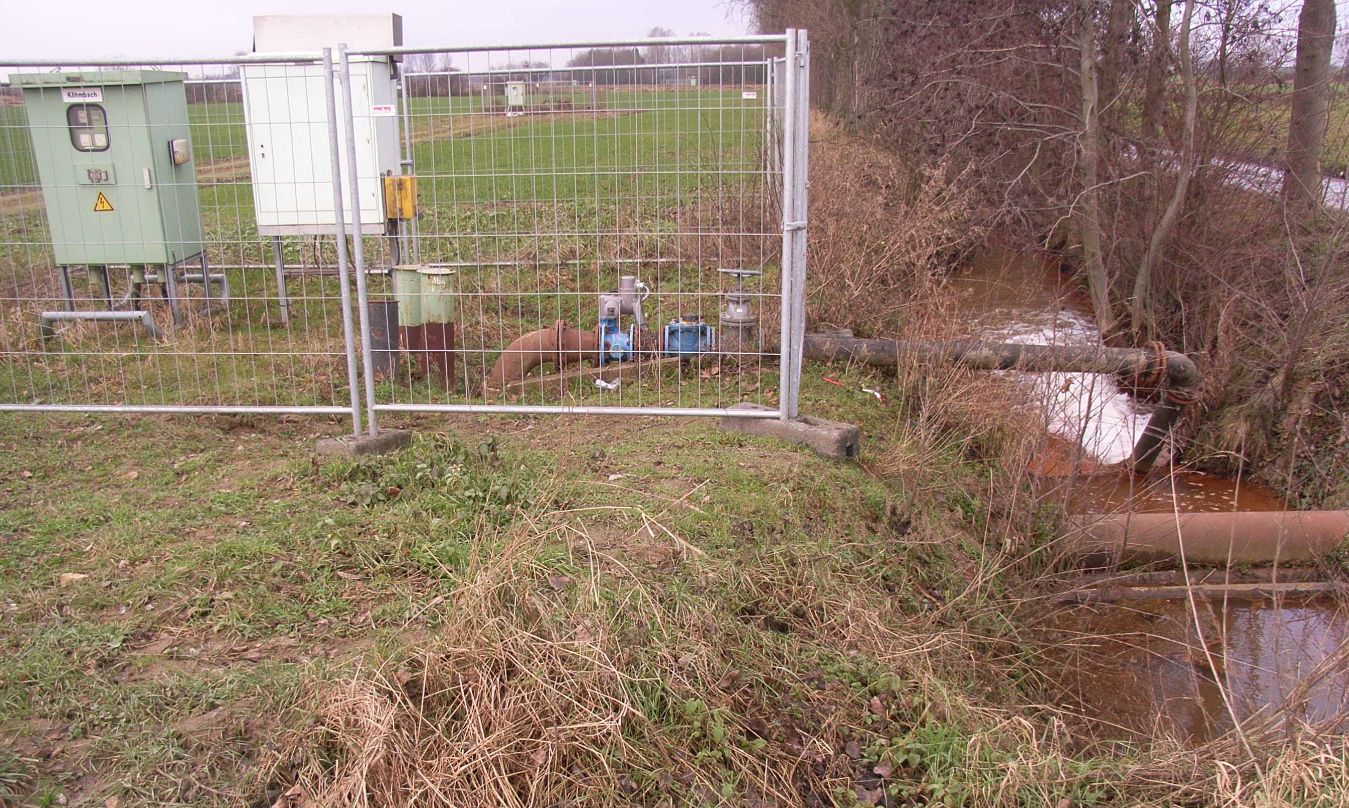 Pumpstation Köhmbach bei Otzenrath, Tagebau Garzweiler